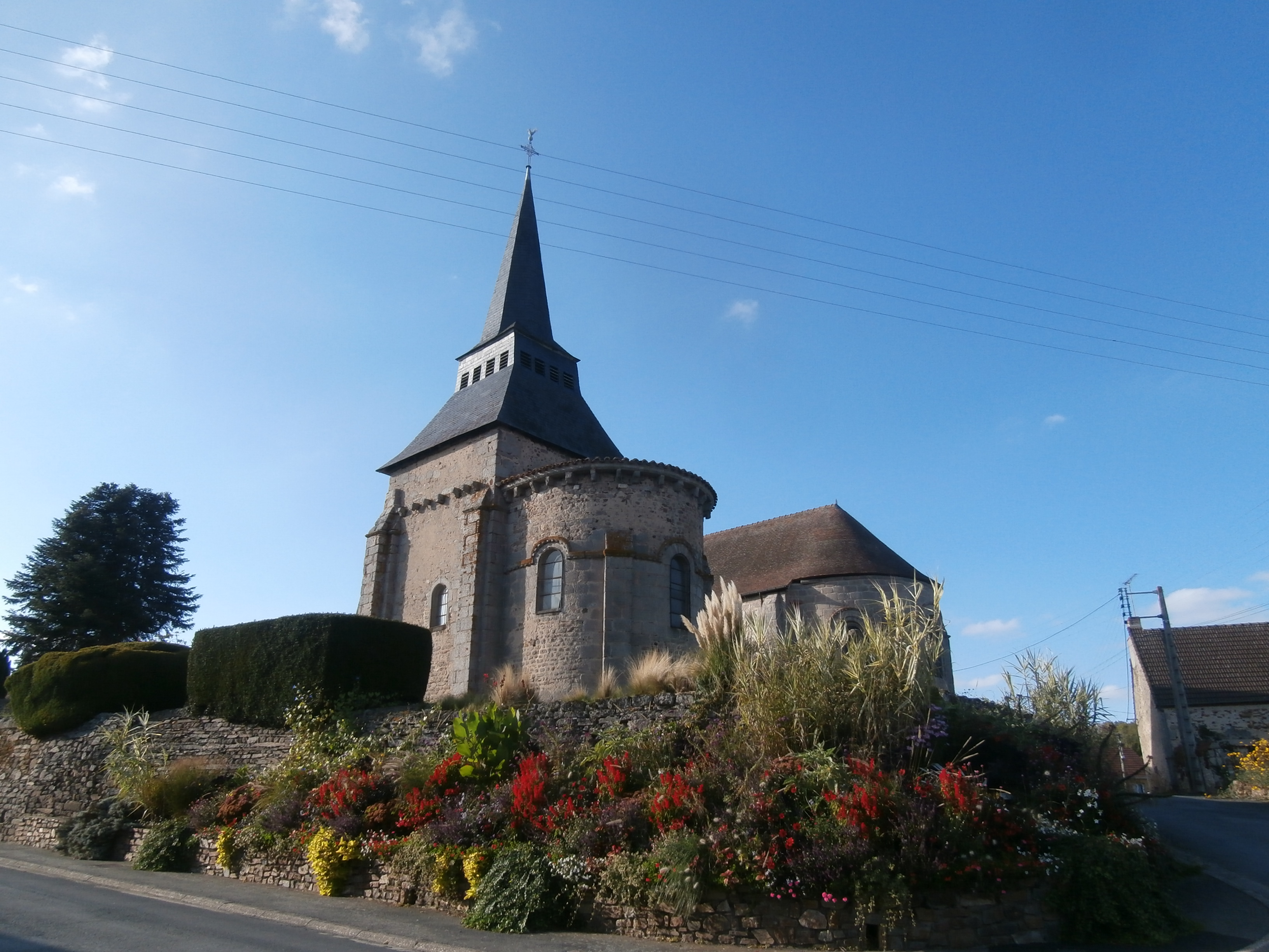 église